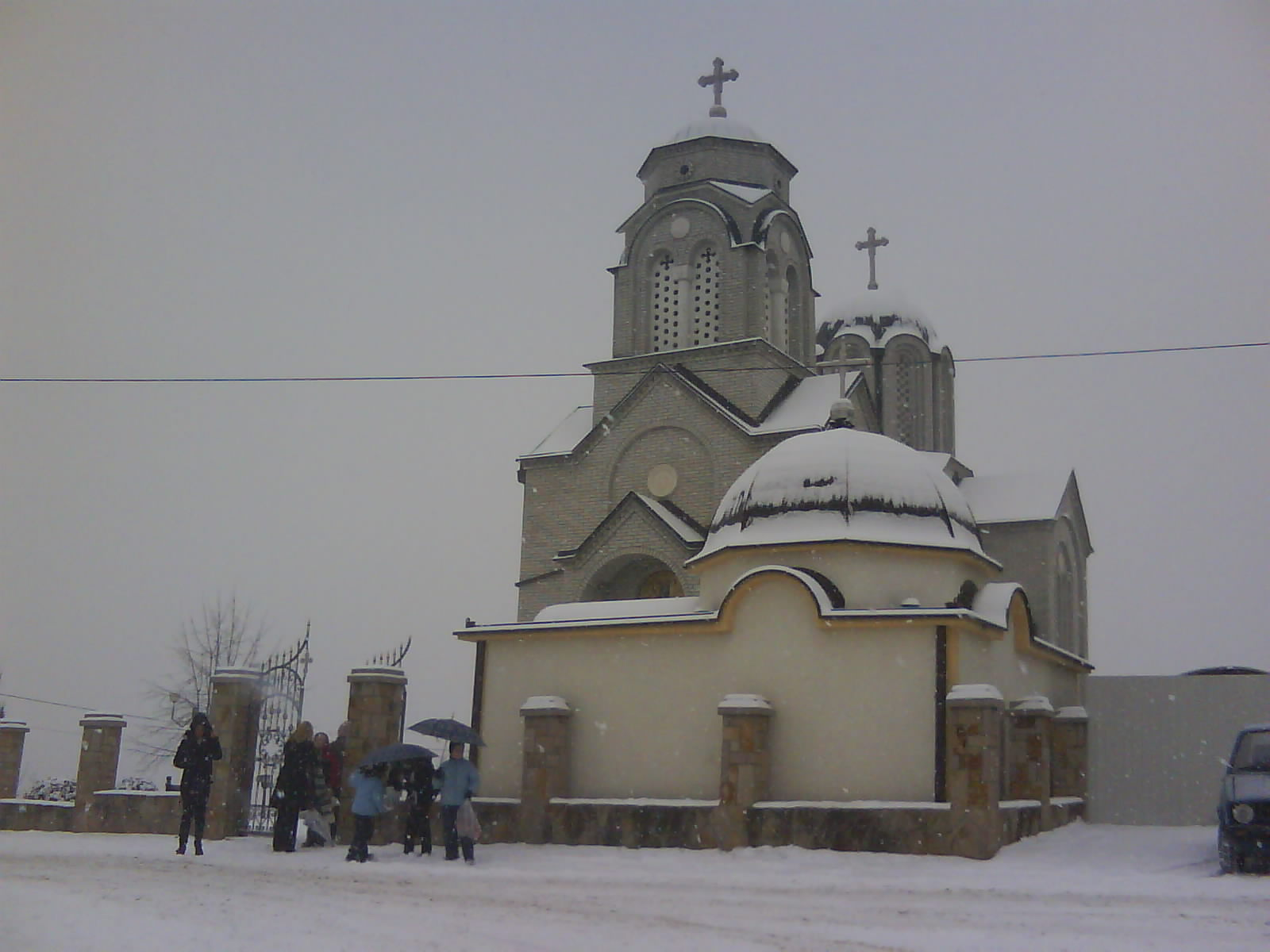 Crkva u Beloševcu. Autor Nenad Markovic